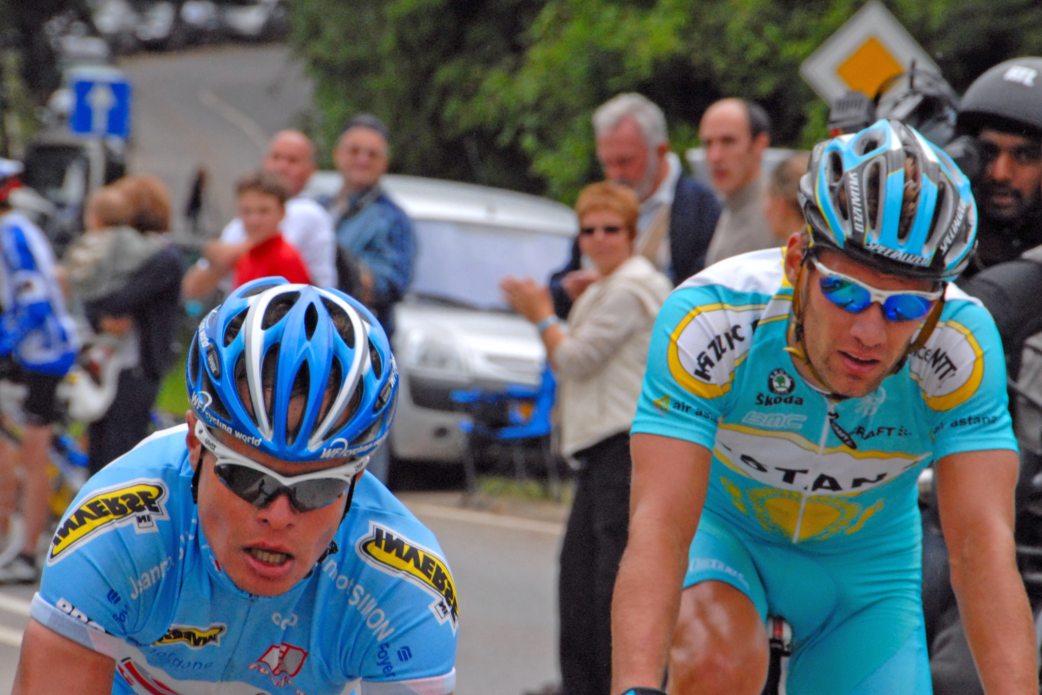 Sujet: Landesmeeschterschaft op der Strooss 2007, Course en Ligne, Christian Poos (l.) a Benoît Joachim (r.), uewen um Keeler Poteau Auteur: Fliedermaus (opgehellt vum Cornischong Source: Eege Photo vum 1. Juli 2007 Lizenz: GFDL